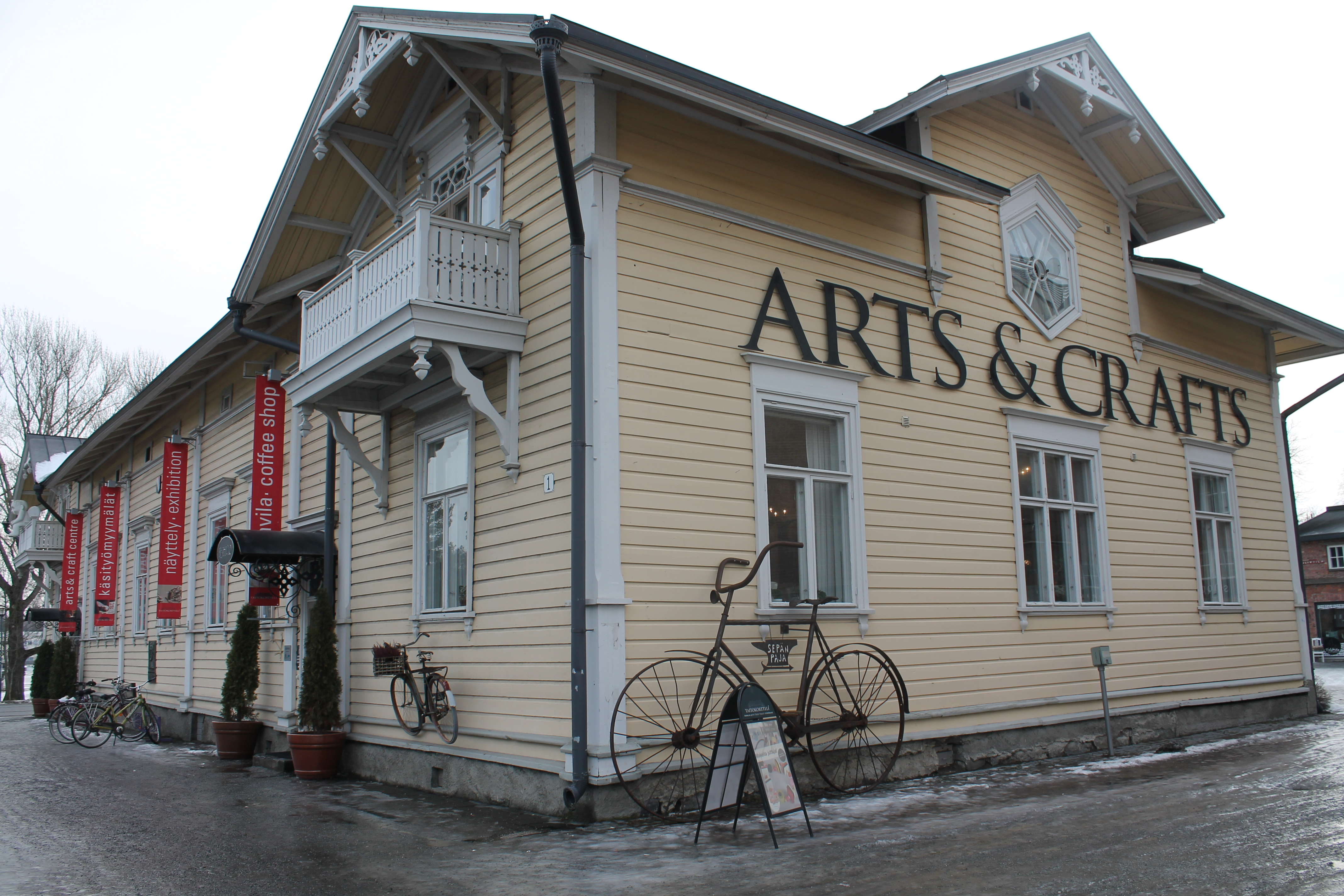 Дом Мустонена (вид со стороны площади)